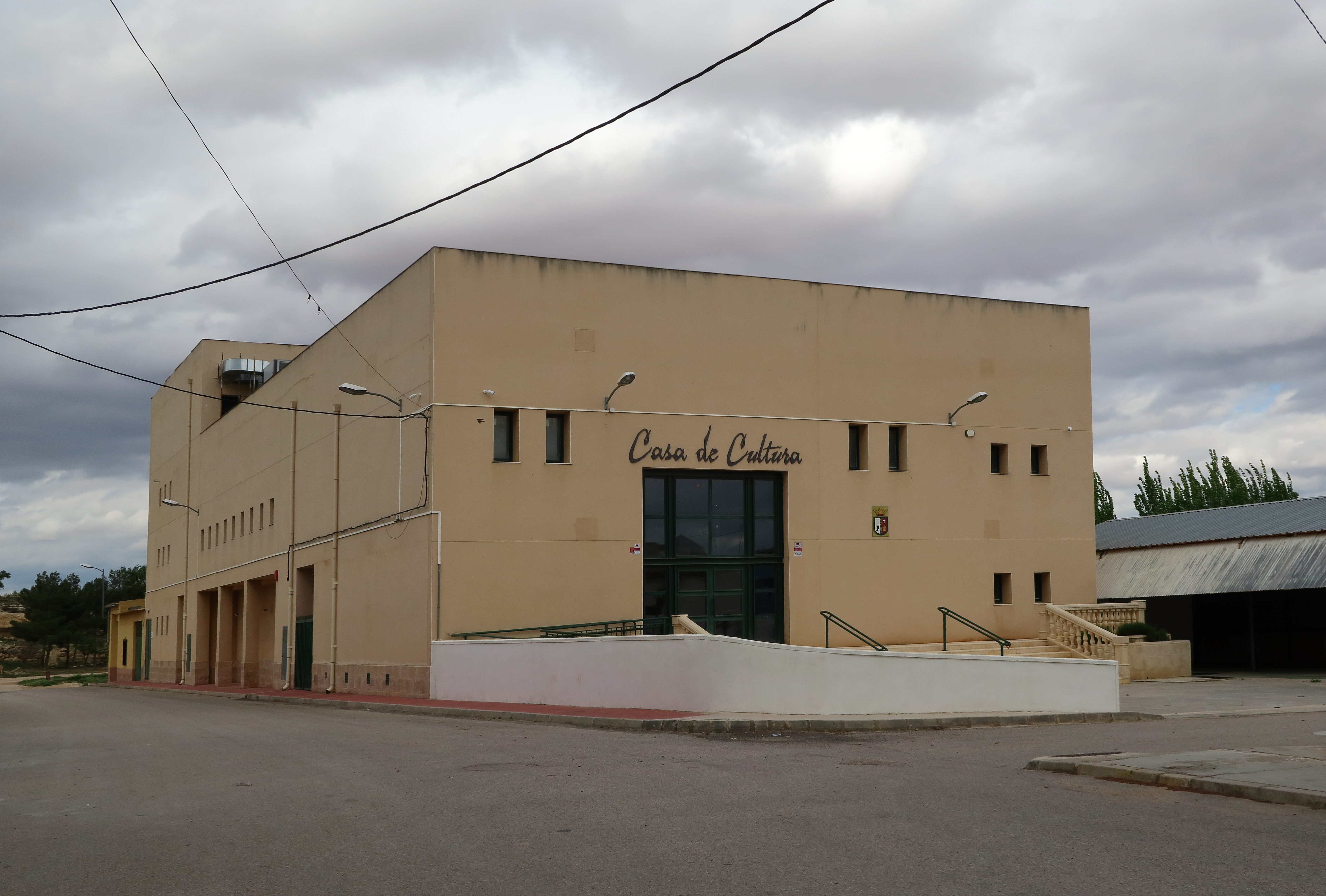 Ledaña, Casa de Cultura